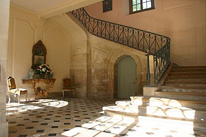 Escalier d'honneur du château de Condé, Aisne, Picardie, France.